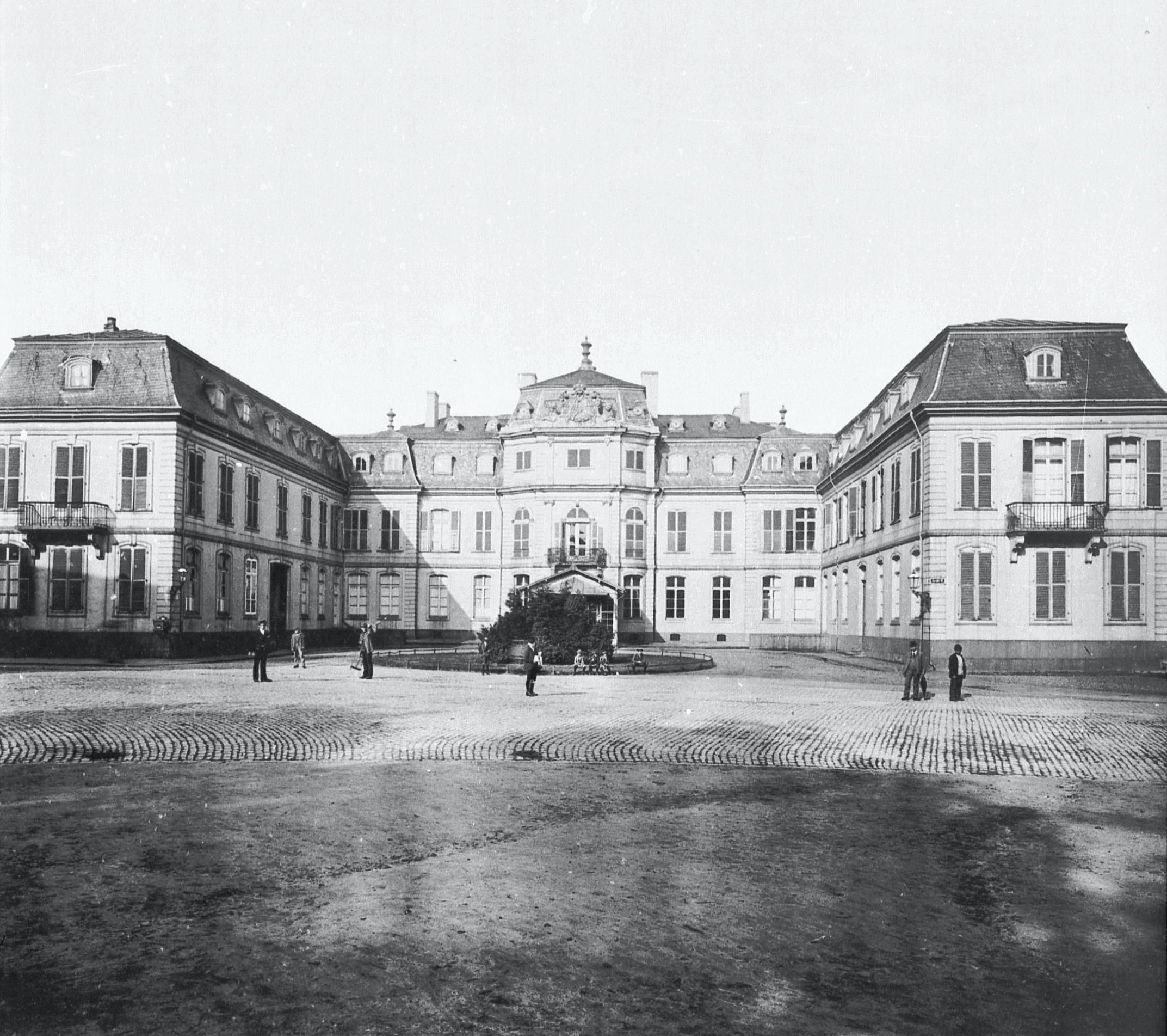 Schloss Jägerhof, Düsseldorf - Gartenseite